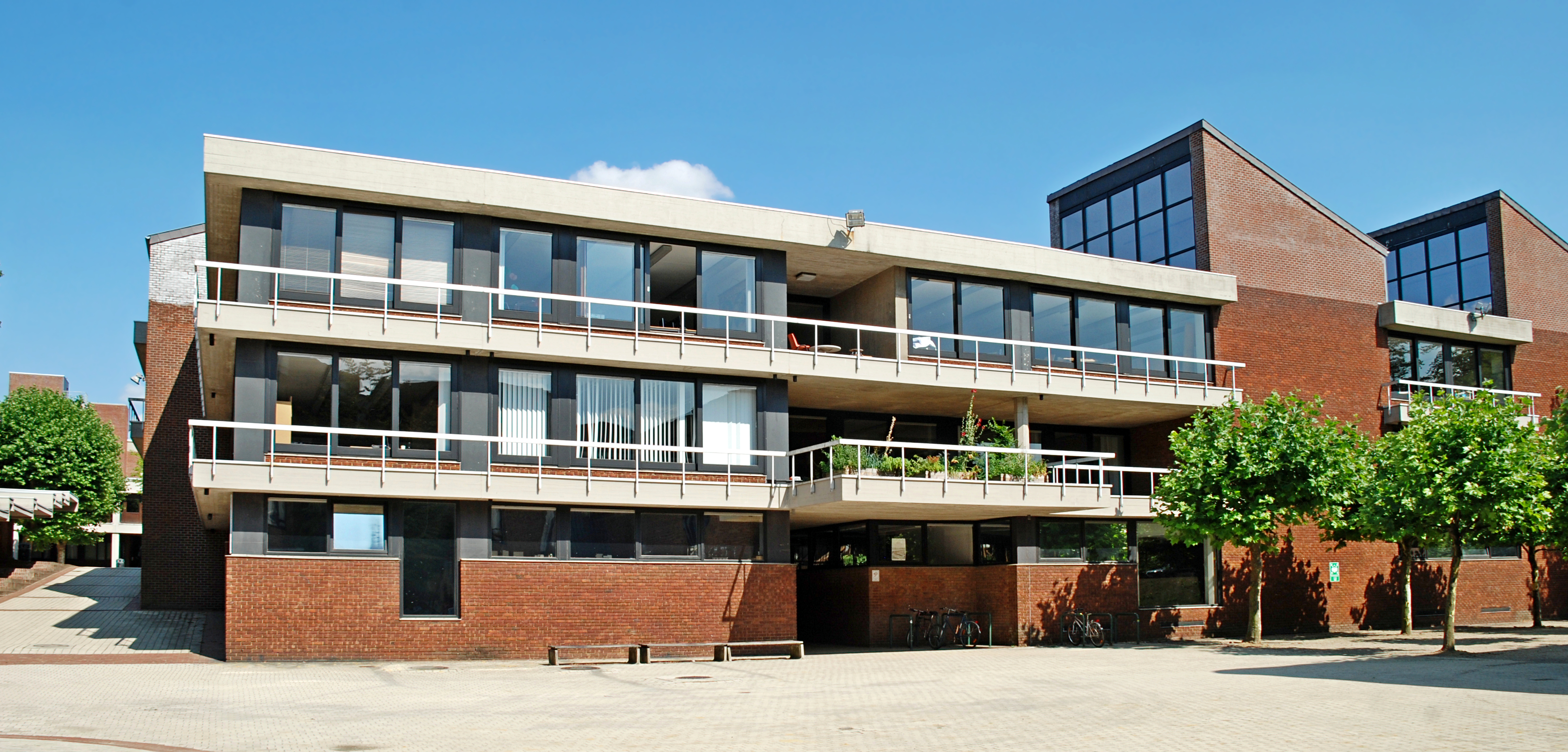 Belgique - Brabant wallon - Louvain-la-Neuve - Place Sainte-Barbe - bâtiment Vinci This photo of immovable heritage has been taken in the Walloon Region